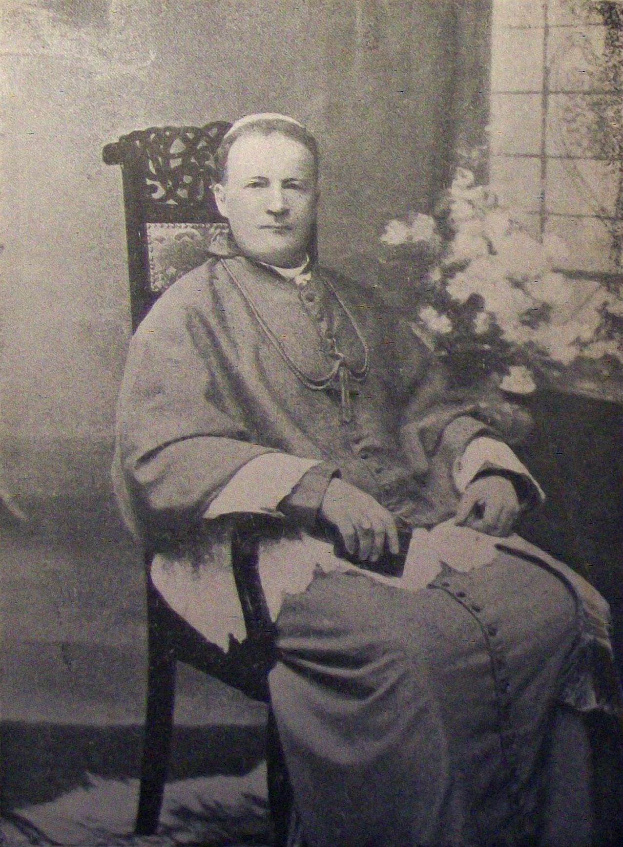 Ks. dr Józef Bilczewski, arcybiskup i metropolita krakowski